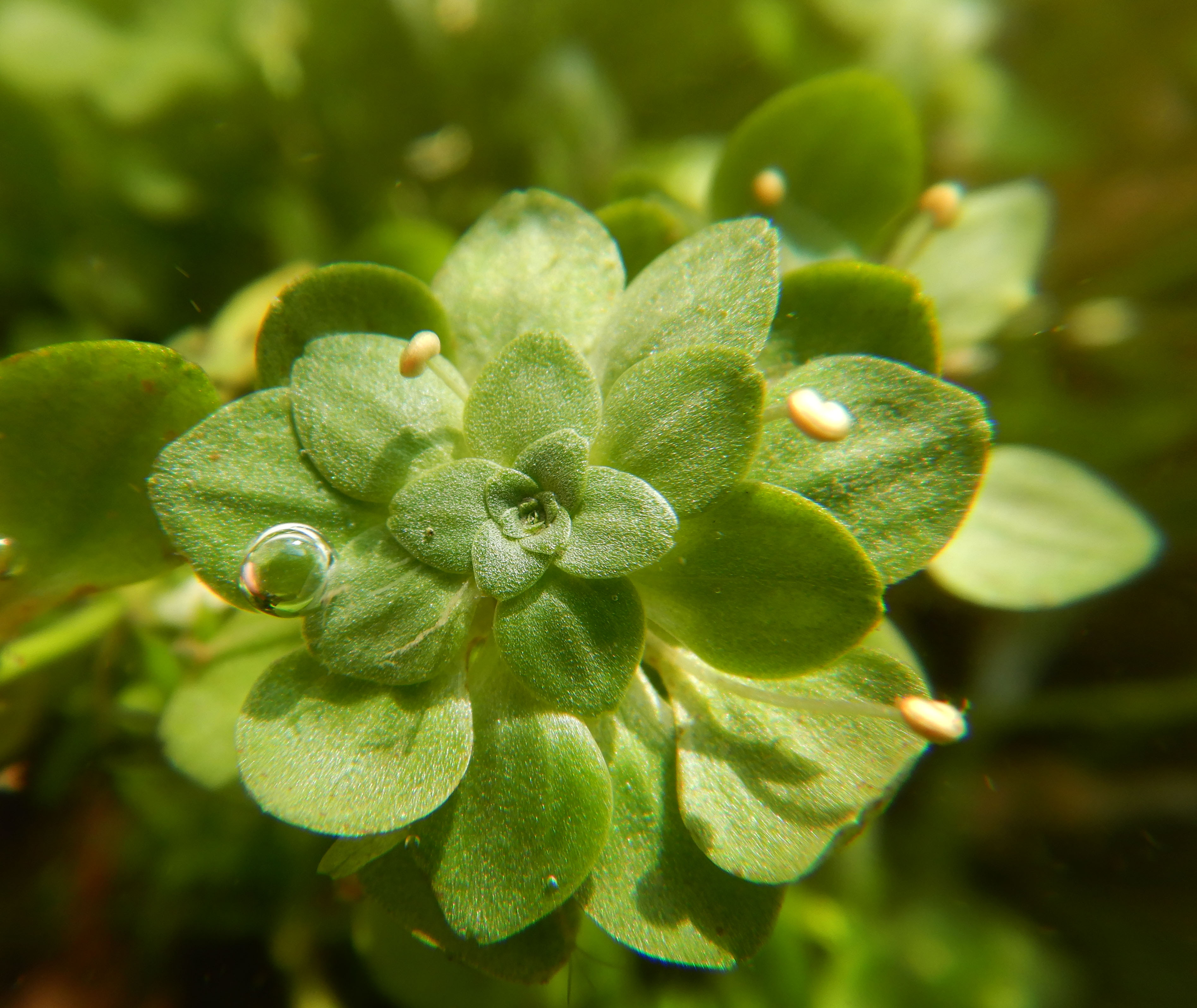 Vue subaquatique d'une partie d'un "Herbier d'eau douce" de Callitriche (Callitriche sp.) . Malgré plusieurs périodes de pluies successives jusqu'à quelques heures avant le moment de la photo l'eau est restée claire. Cet habitat naturel est situé dans l'Authie (dans la Région Hauts-de-France), à 1 km environ avant l'Abbaye de Valloires et une centaine de mètre en amont du moulin d'Argoule.